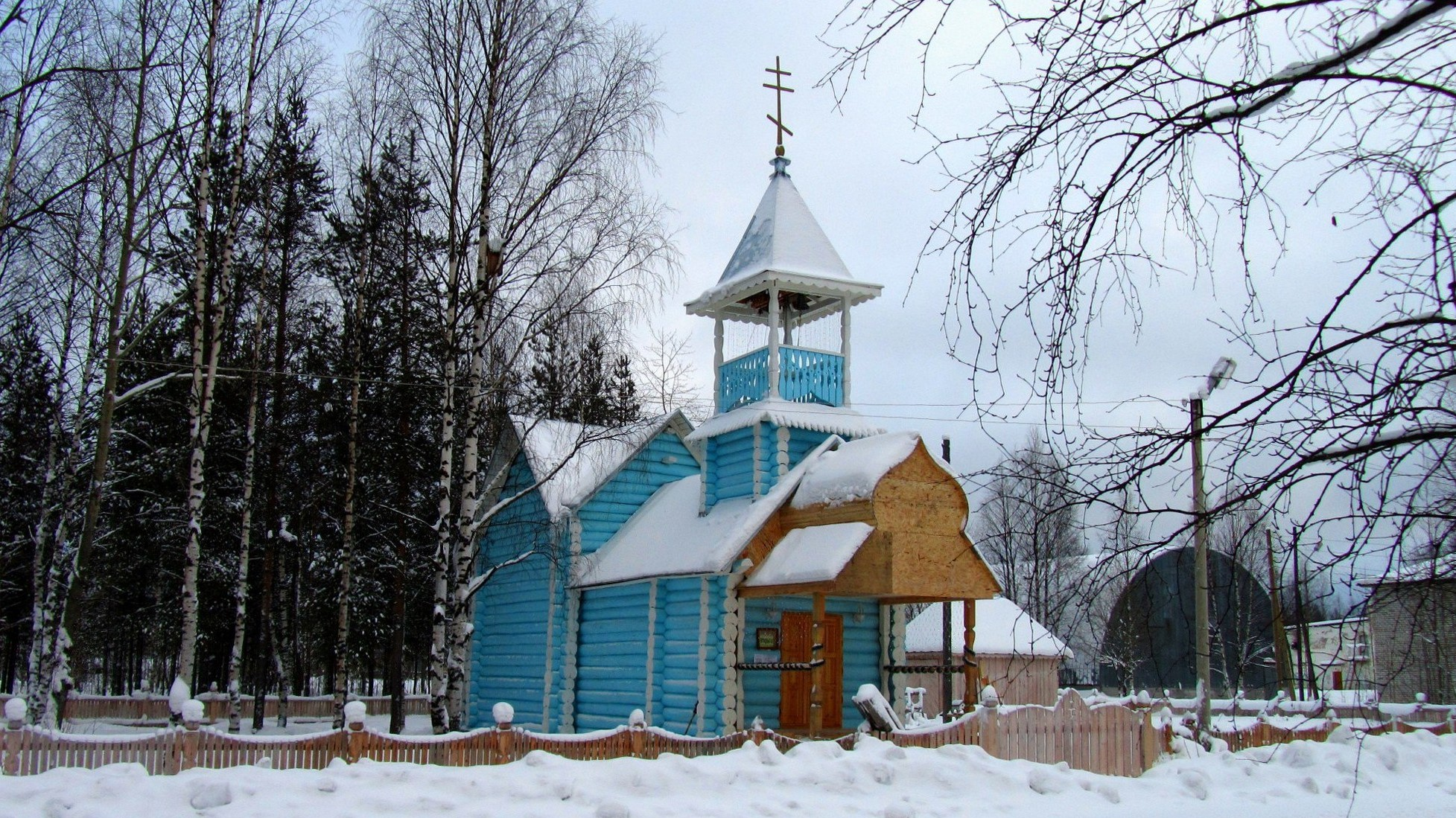 Церковь иконы Божией Матери "Всецарица" в Муезерском посёлке.